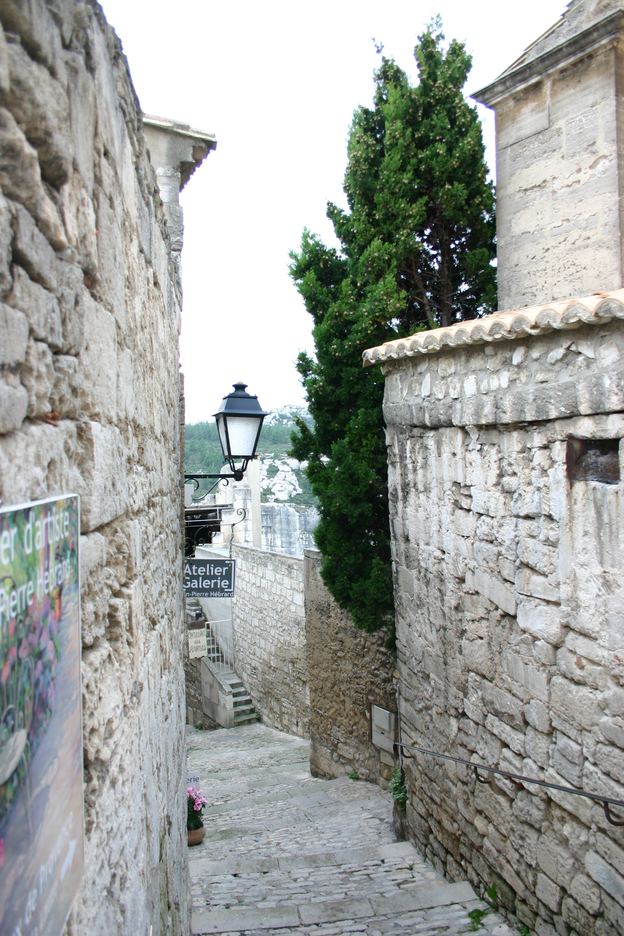 Les Baux de Provence - street